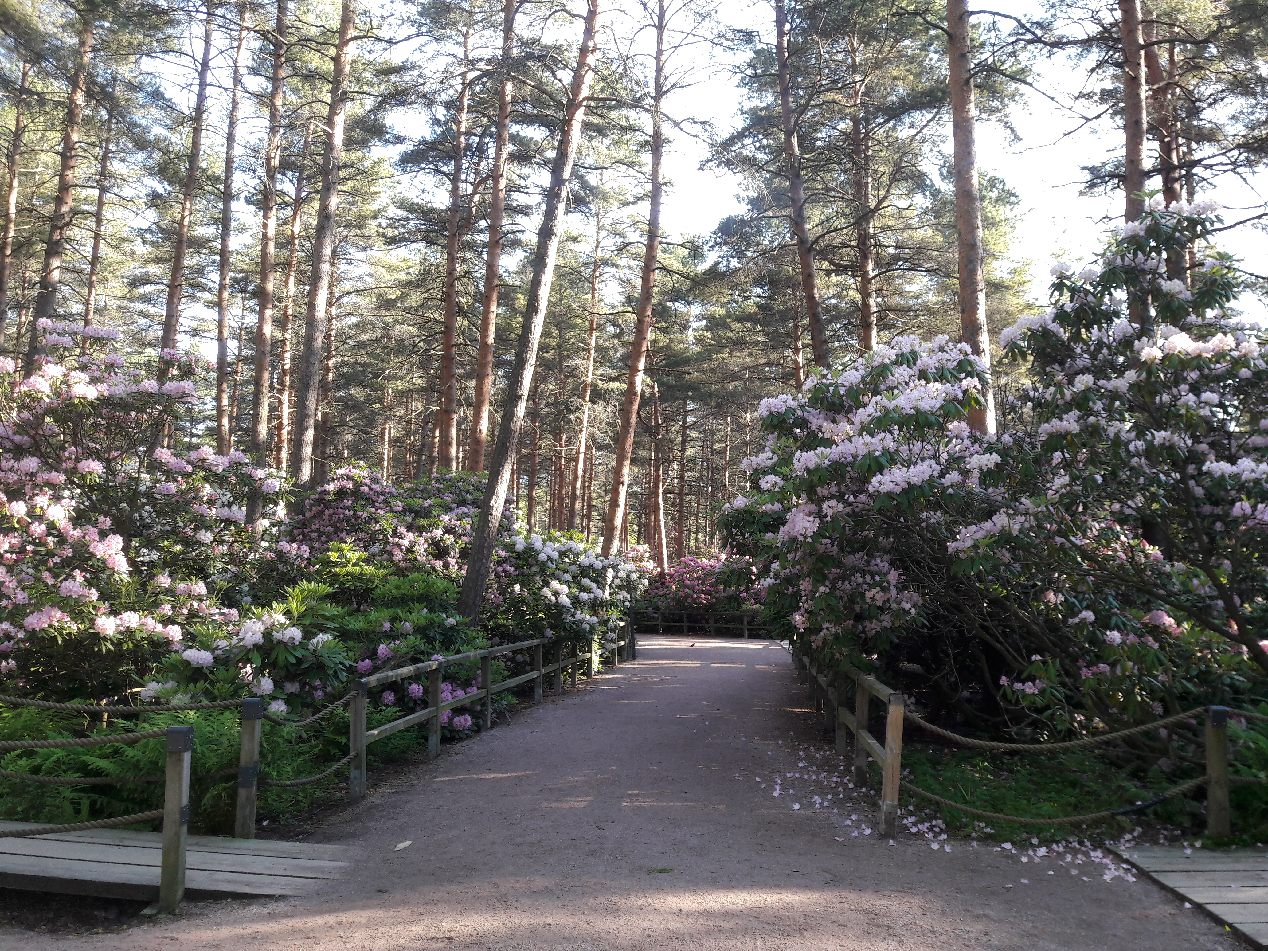 Alppiruusupuisto kukinnan aikana.